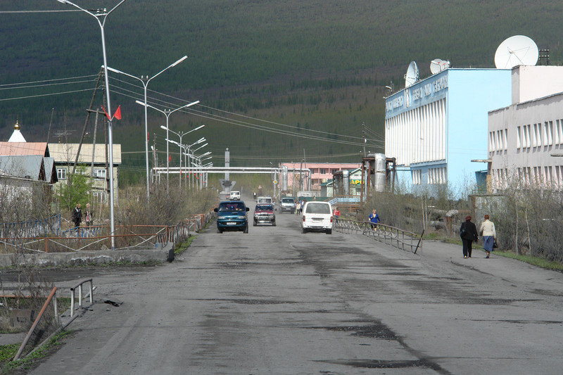 Усть-Нера сегодня